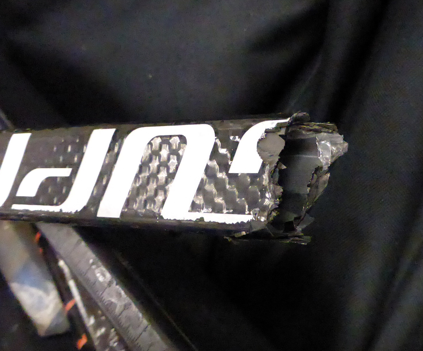 Carbon-Eishockeyschläger im Trainingszentrum (Kölnarena 2) des KEC.